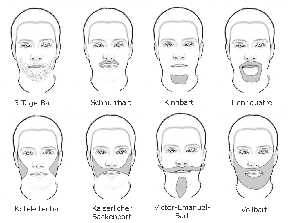 verschiedene Barttypen grafisch veranschaulicht